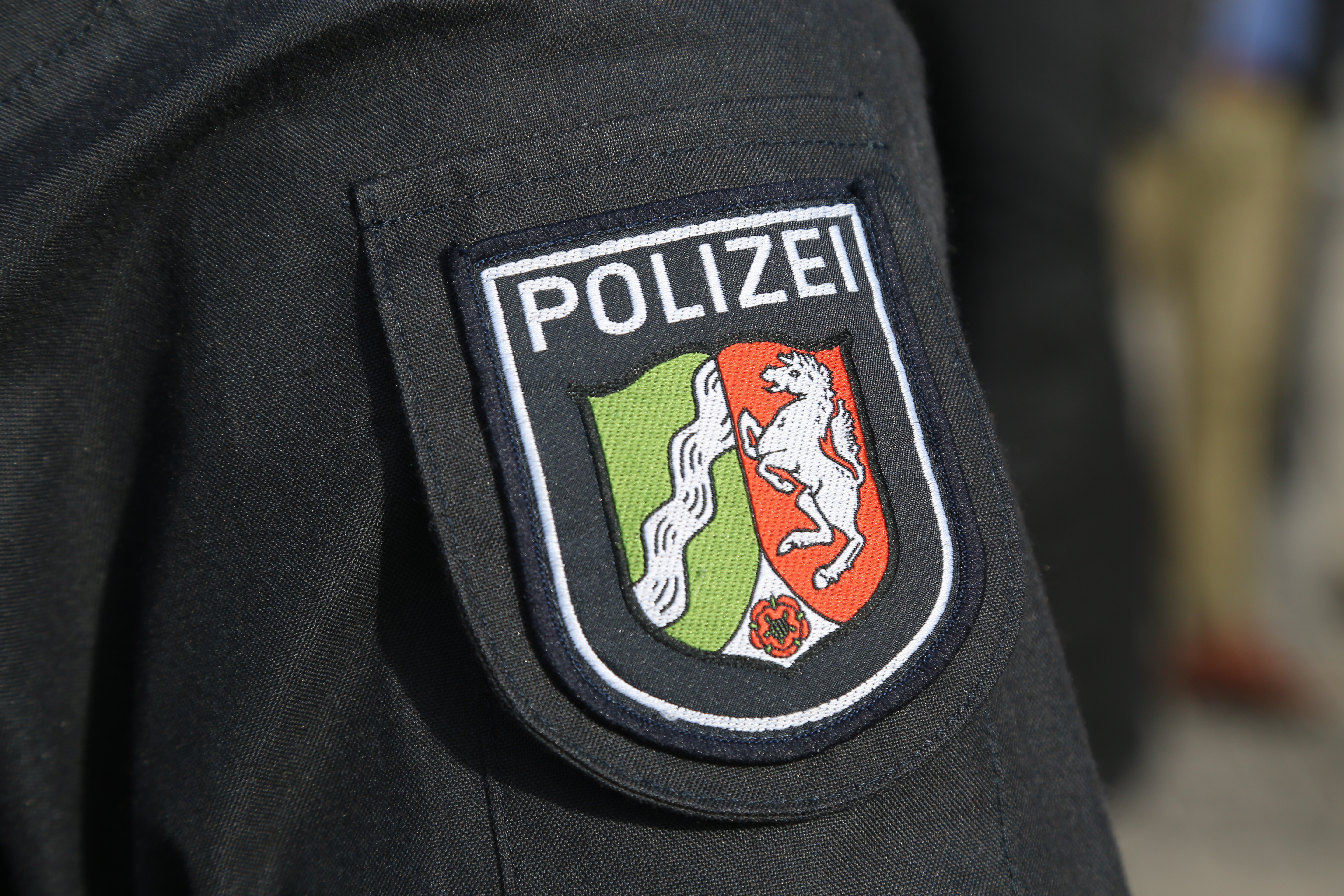 Ärmelwappen der Polizei Nordrhein-Westfalen